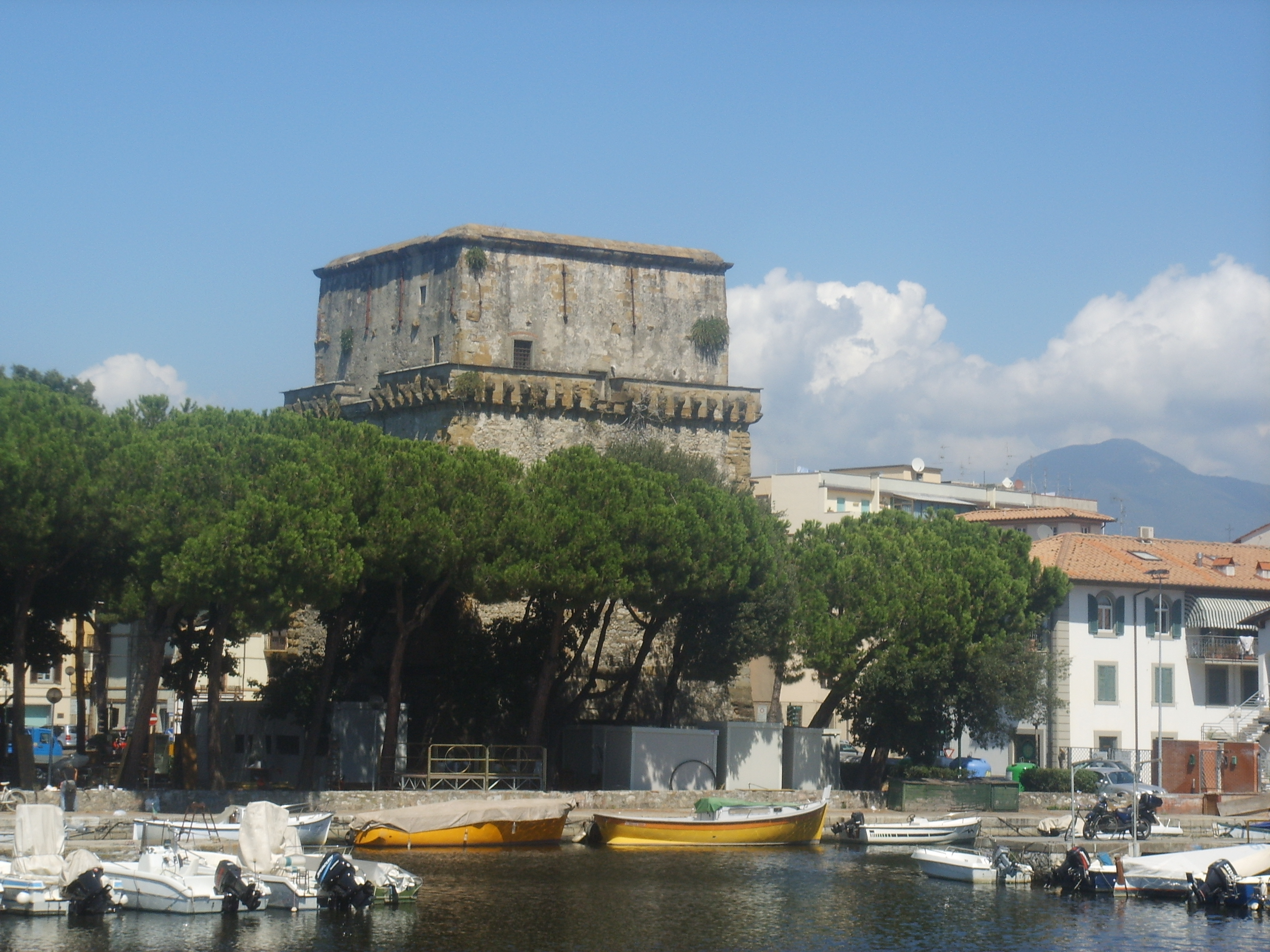 Viareggio, torre_matilde in Viareggio, italy